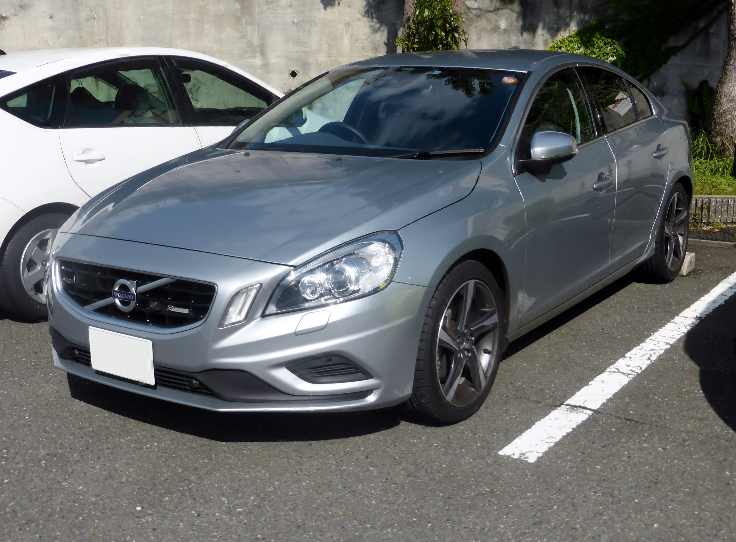 2代目ボルボ・S60 T6 AWD R-DESIGN をフロントから撮影。